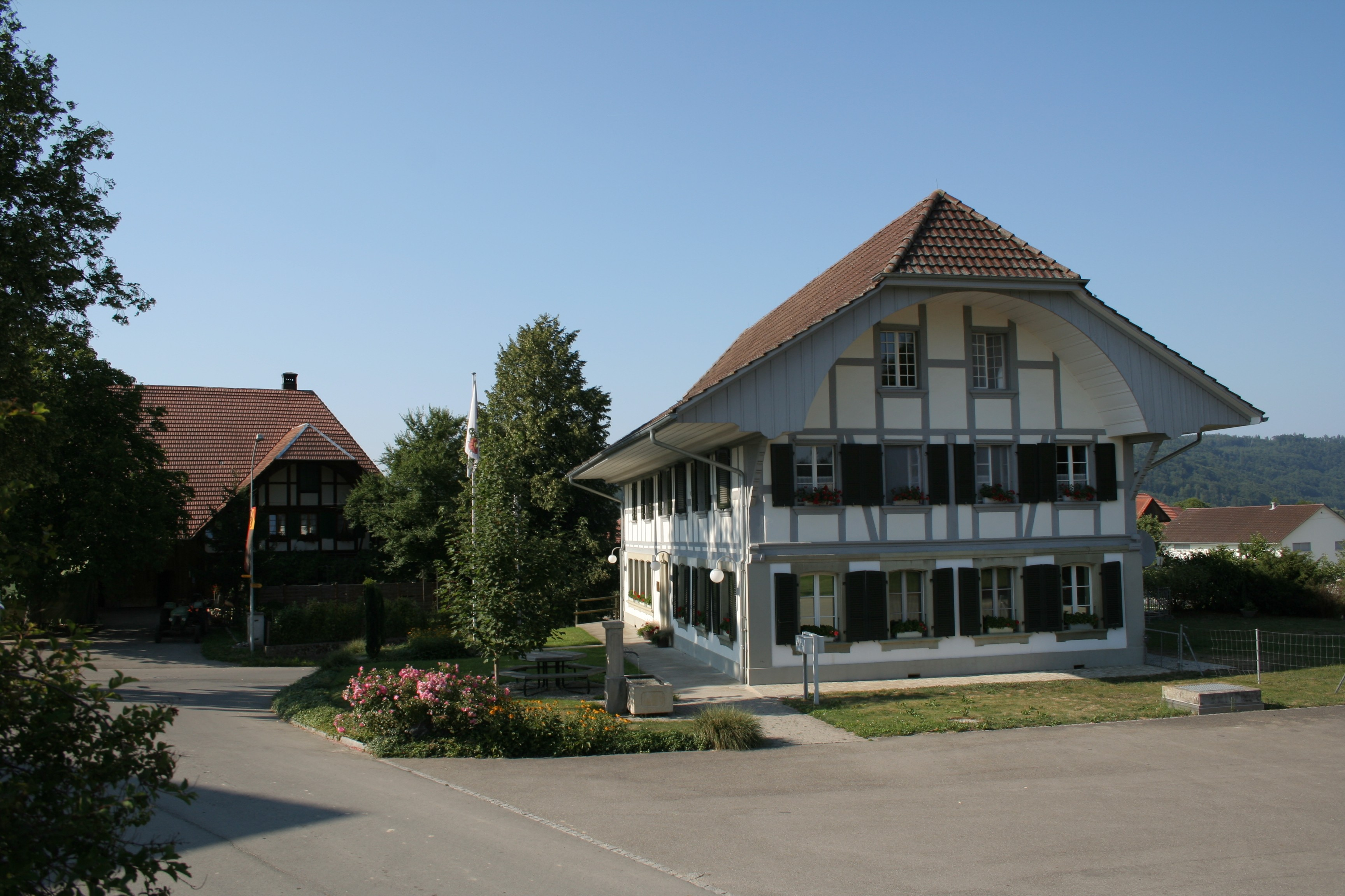 Das Gemeindehaus von Wengi, Bezirk Büren, Schweiz